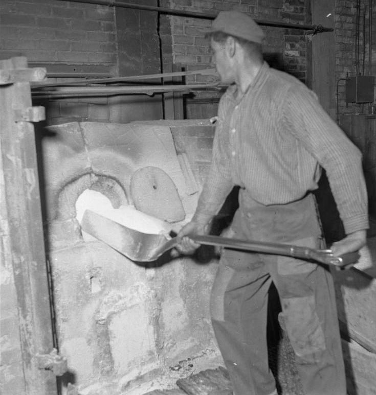 Neu-Gablonz bei Kaufbeuren/Schwaben. Am Schmelzofen einer Glashütte.